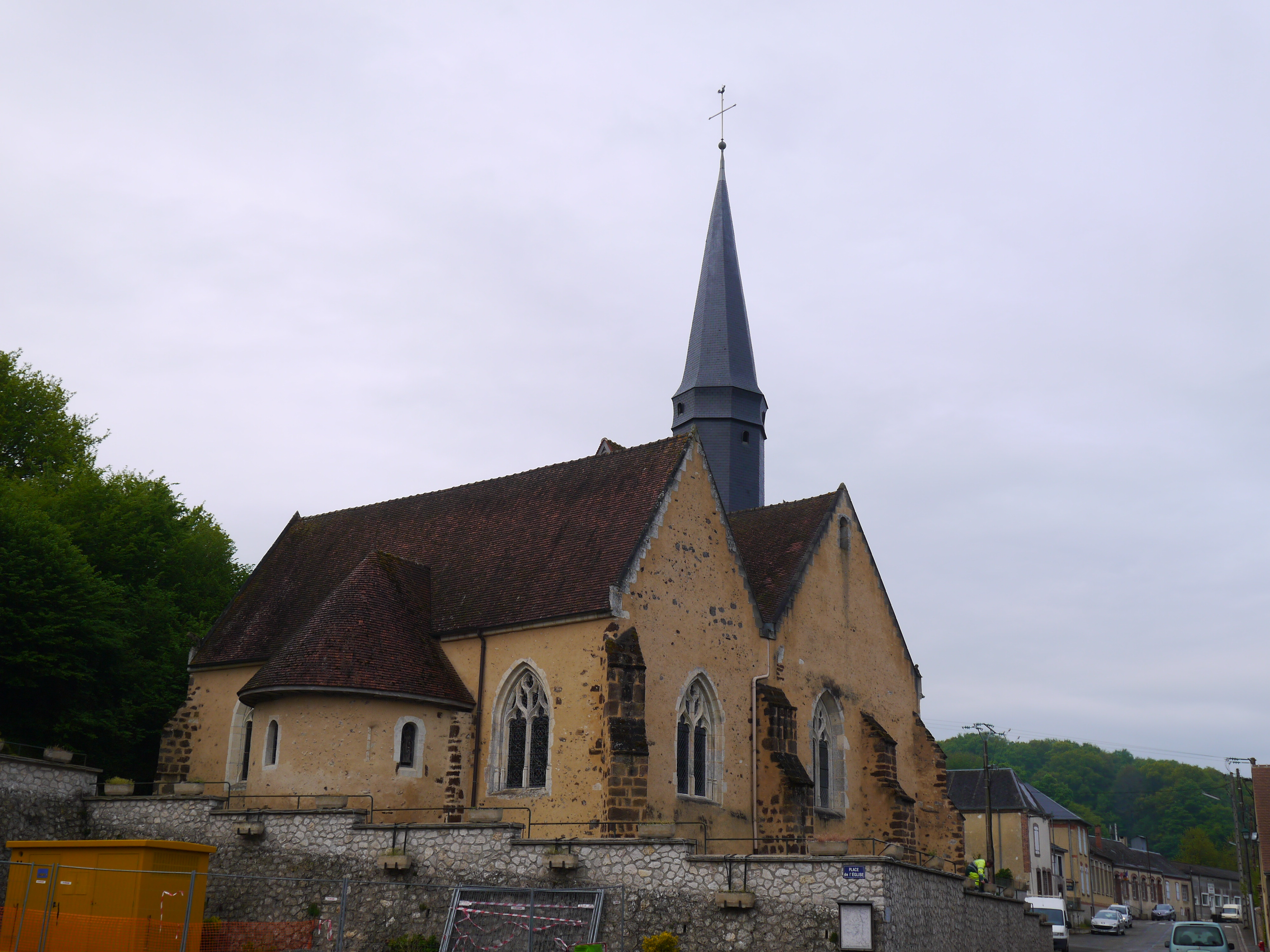 L'église Saint-Étienne.